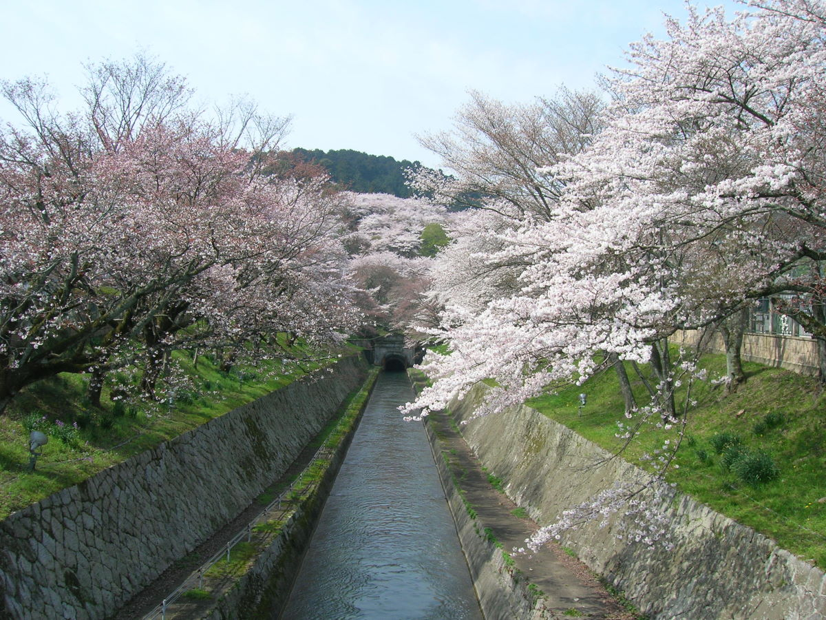 Sosui in Otsu. Biwako Sosui (Lake Biwa Canal) in Otsu city